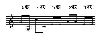 afinacion de ronrroco ロンロコの調弦